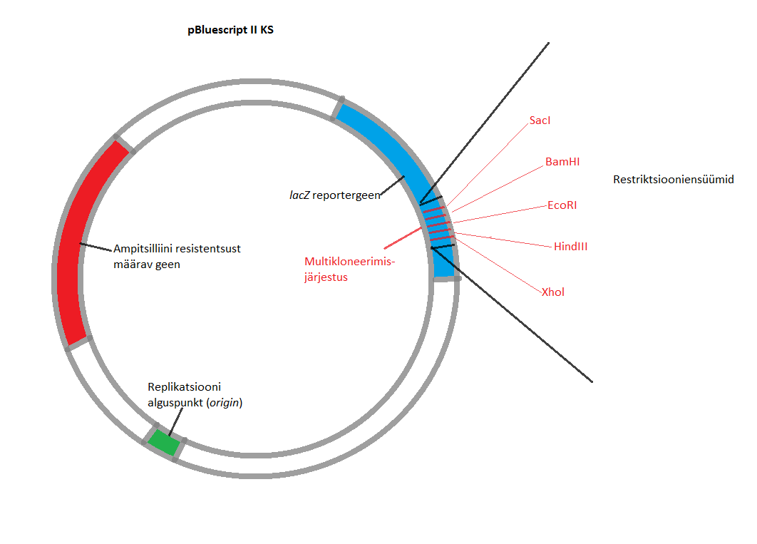 plasmiidse vektori pBluescript II KS illustratiivne joonis